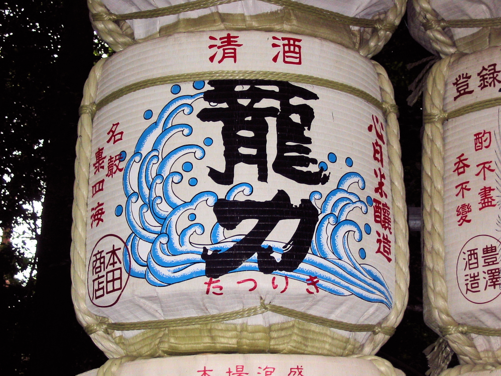 Sake barrel offering, Meiji Shrine, Yoyogi Park, Tokyo